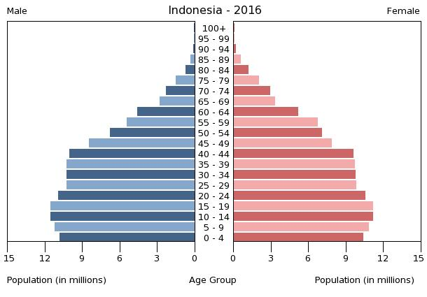 A population pyramid illustrates the age and sex structure of a country's population and may provide insights about political and social stability, as well as economic development. The population is distributed along the horizontal axis, with males shown on the left and females on the right. The male and female populations are broken down into 5-year age groups represented as horizontal bars along the vertical axis, with the youngest age groups at the bottom and the oldest at the top. The shape of the population pyramid gradually evolves over time based on fertility, mortality, and international migration trends.